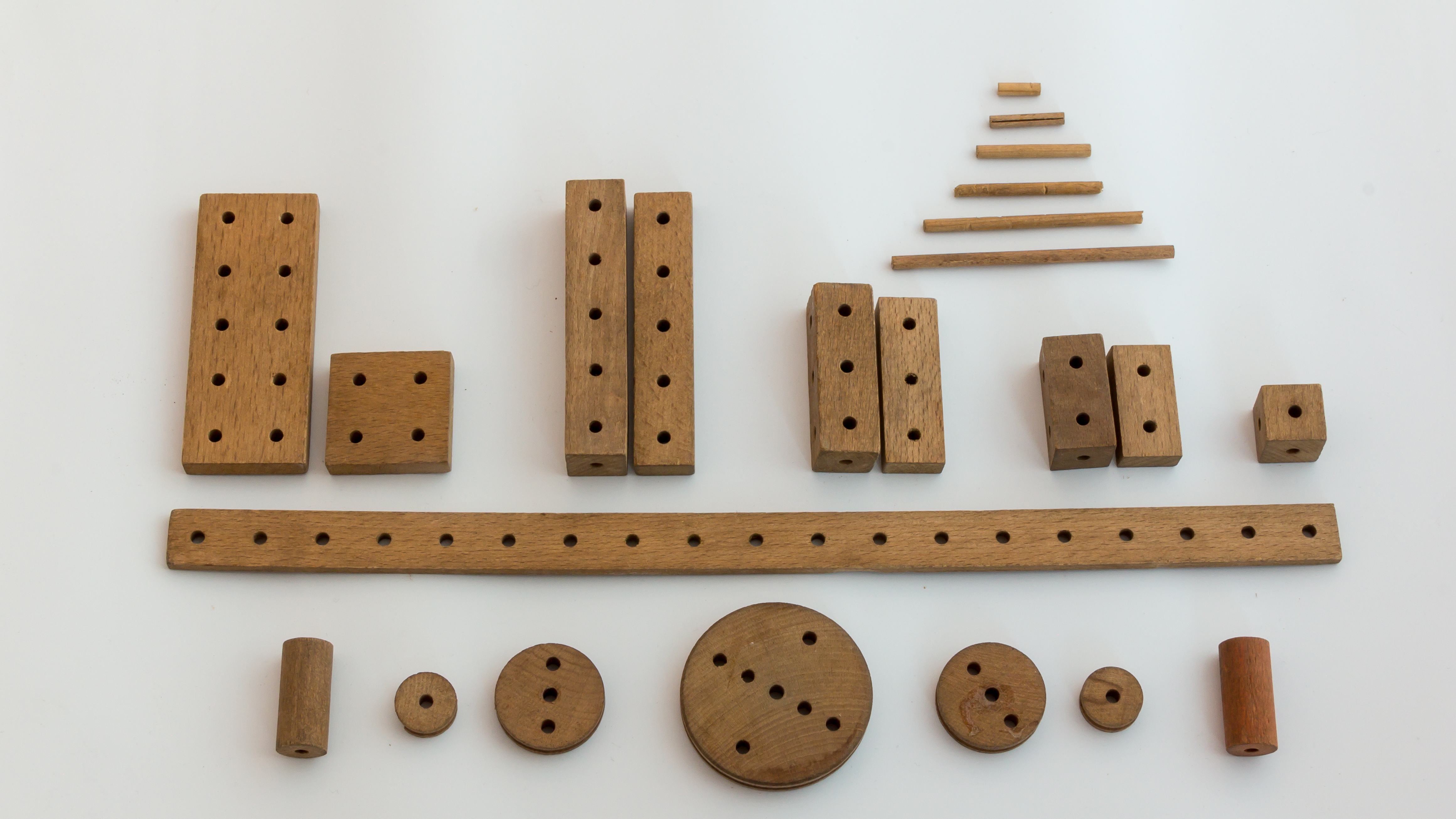 Matador-Holzbaukasten